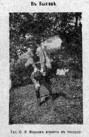 Генерал Марков играет в чехарду во время Быховского заключения, осень 1917 года